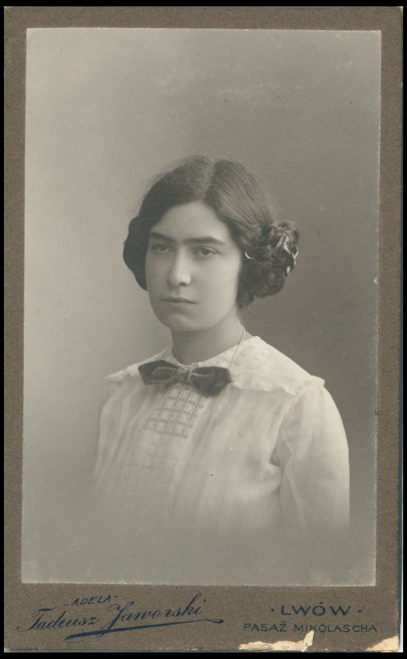 Janina Mierzecka, 1913 r.